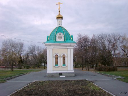 Часовня на месте Ильинской горки в Омске в честь пророка Ильи. Построена на деньги месных предпринимателей. Символизирует реновацию Ильинского храма, снесённого в 1930-х годах.